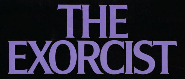 Logo von The Exorcist